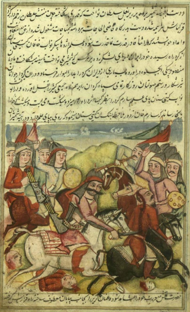 I Şah İsmayılın Kürd qiyamçılara qarşı döyüşü.